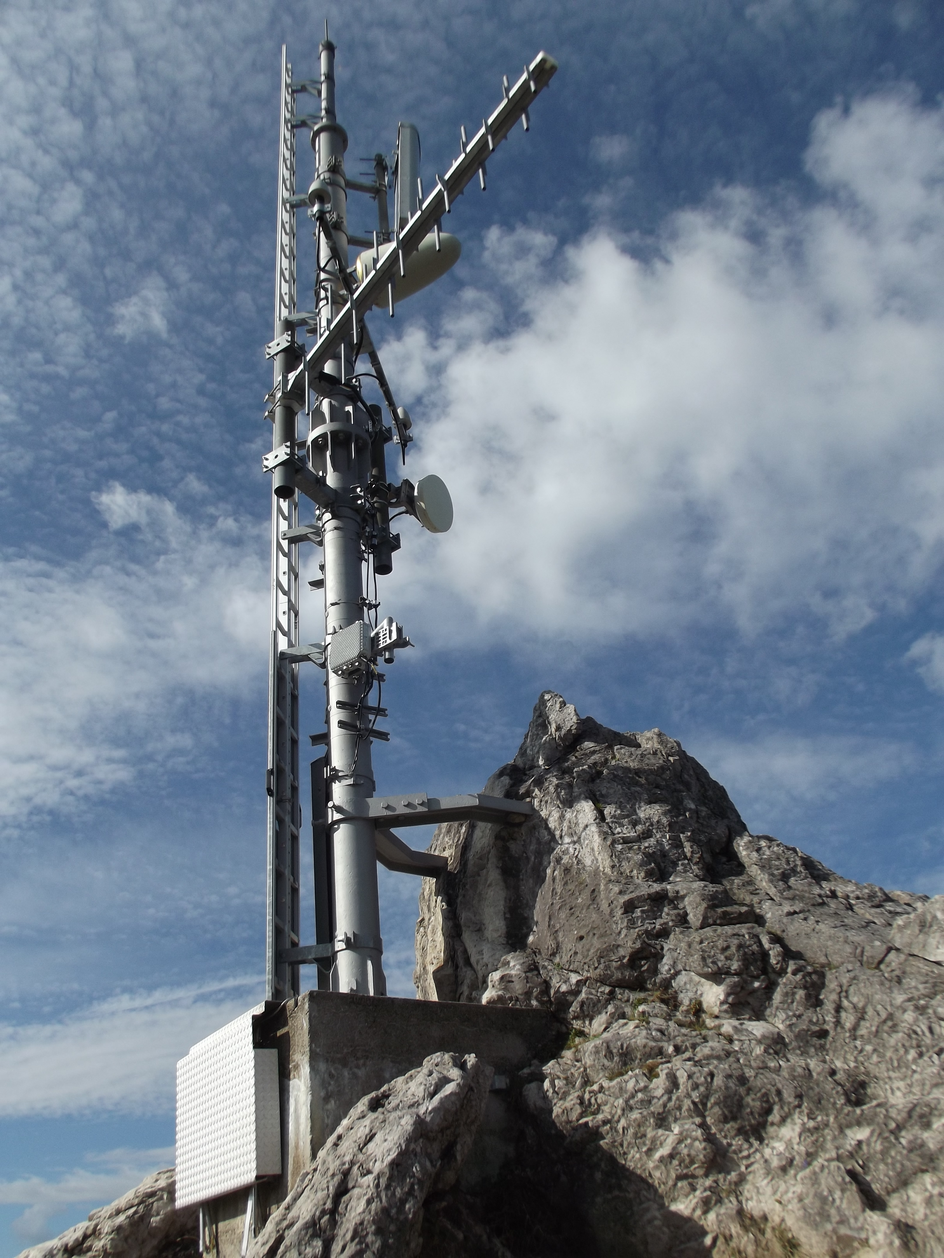 Radiosendestation Jenner neben der Jennerbahn Bergstation.